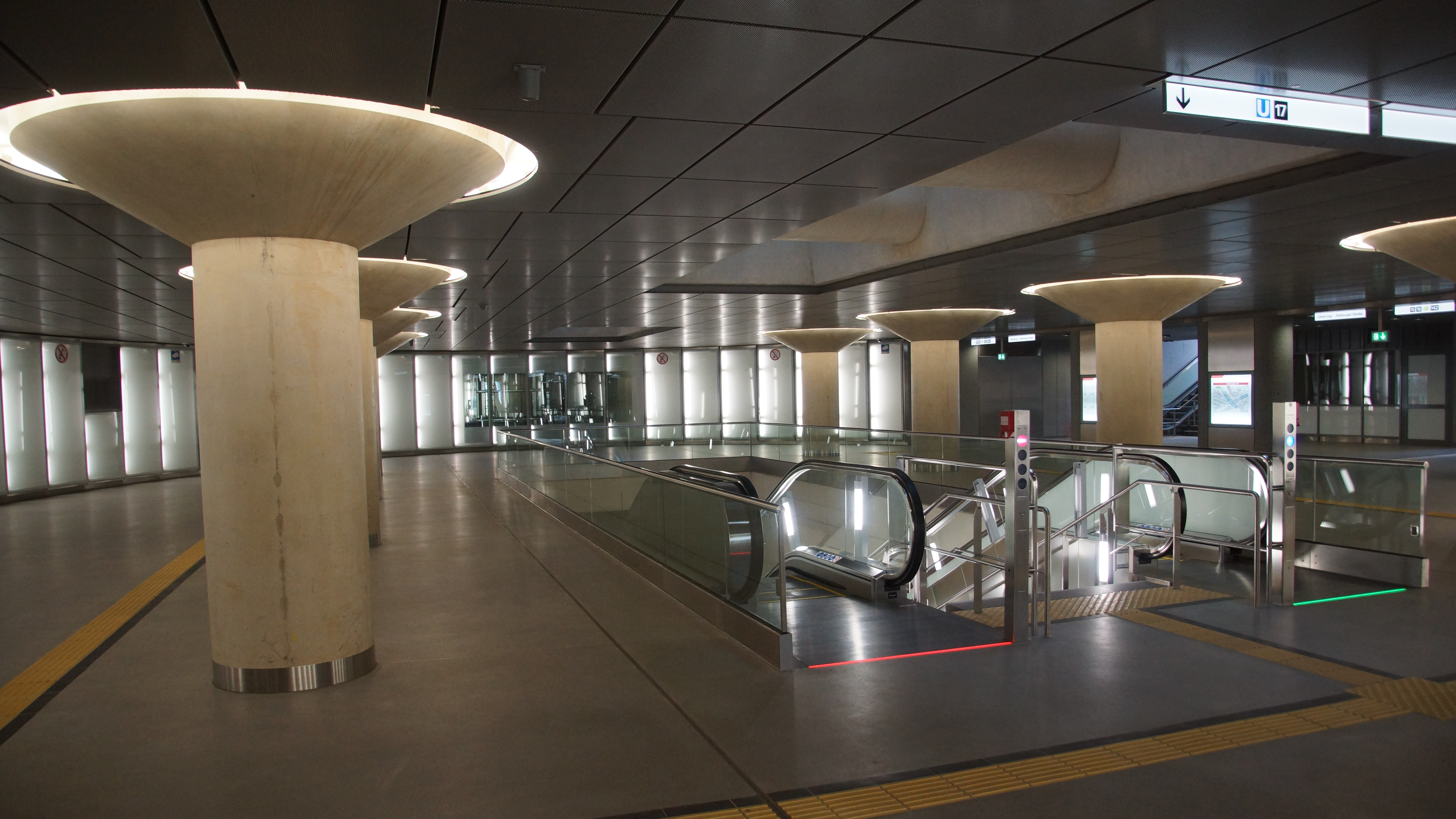 Verteilerebene des U-Bahnhofs Chlodwigplatz